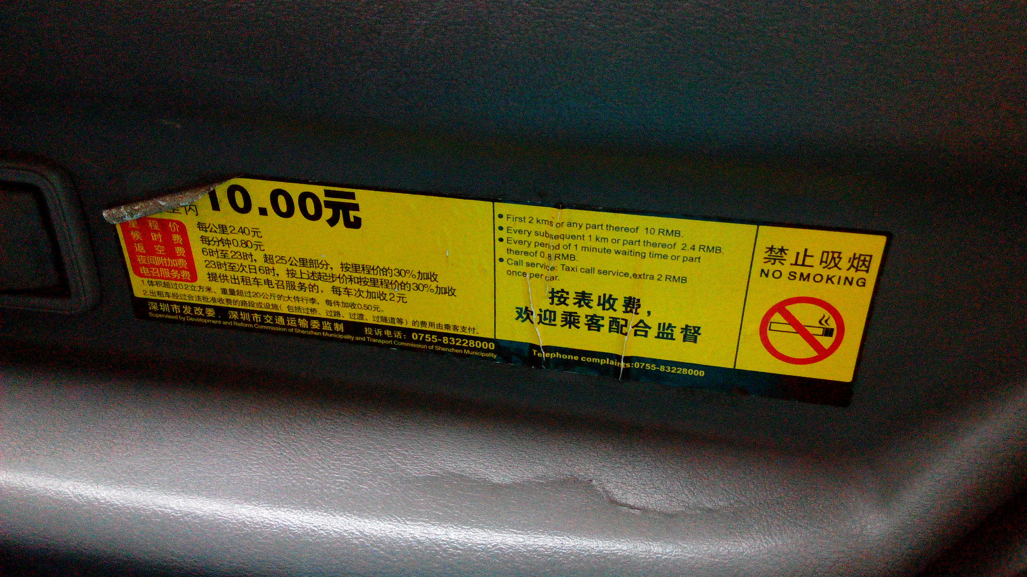 深圳的士车费表